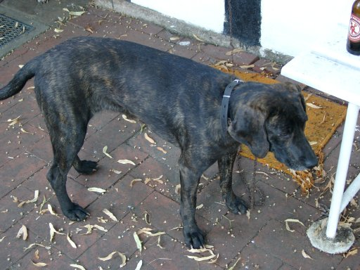 weiblicher Plotthound "Merckxx Ukiah", zweijährig Plott Hound